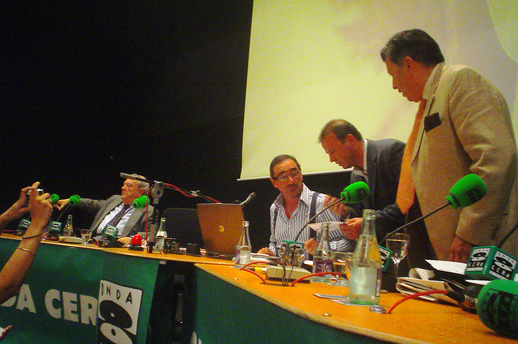 Carlos Herrera durante su programa de radio, en Onda Cero.